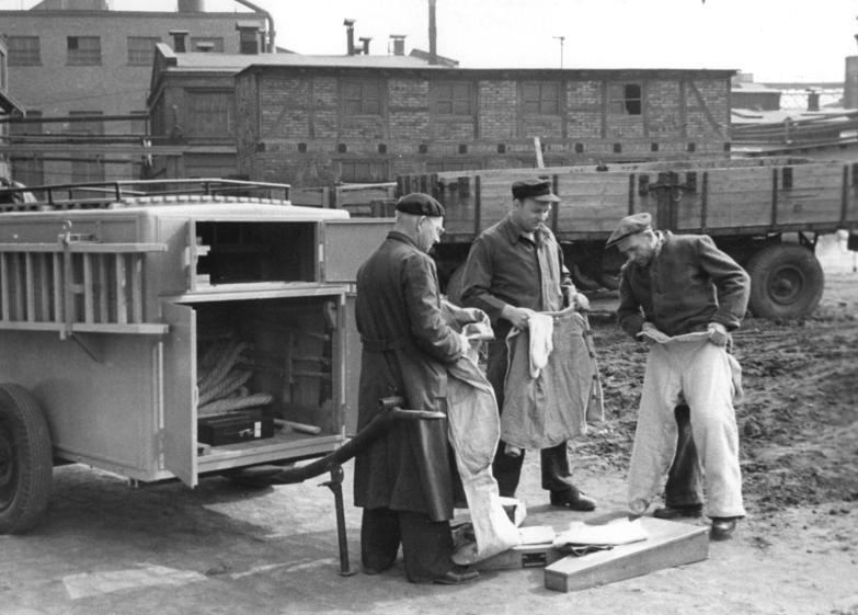 Zentralbild-Biscan, 27.4.1956 Neue Wege im Arbeitsschutz Im volkseigenen chemischen und pharmazeutischen Werk Pahlberg-List in Magdeburg wird der Arbeitsschutz ständig verbessert, um Leben und gesundheit der Werktätigen zu erhalten und die Unfallziffer zu senken. Die neueste Errungenschaft des Werkes ist der aus eigenen Mitteln gebaute Unfallschutz-Gerätewagen, der alle in Fragen kommende Rettungsgeräte, Gasmasken, Schutzanzüge usw. enthält und im Bedarfsfall im Verlauf weniger Minuten an jede Stelle des Werkes gefahren werden kann. UBz: Zur Ausrüstung des Unfallschutz-Gerätewagens gehören auch Asbest-Anzüge, mit denen man Brandstellen betreten kann, und Gummistoffanzüge, die säurefest sind.